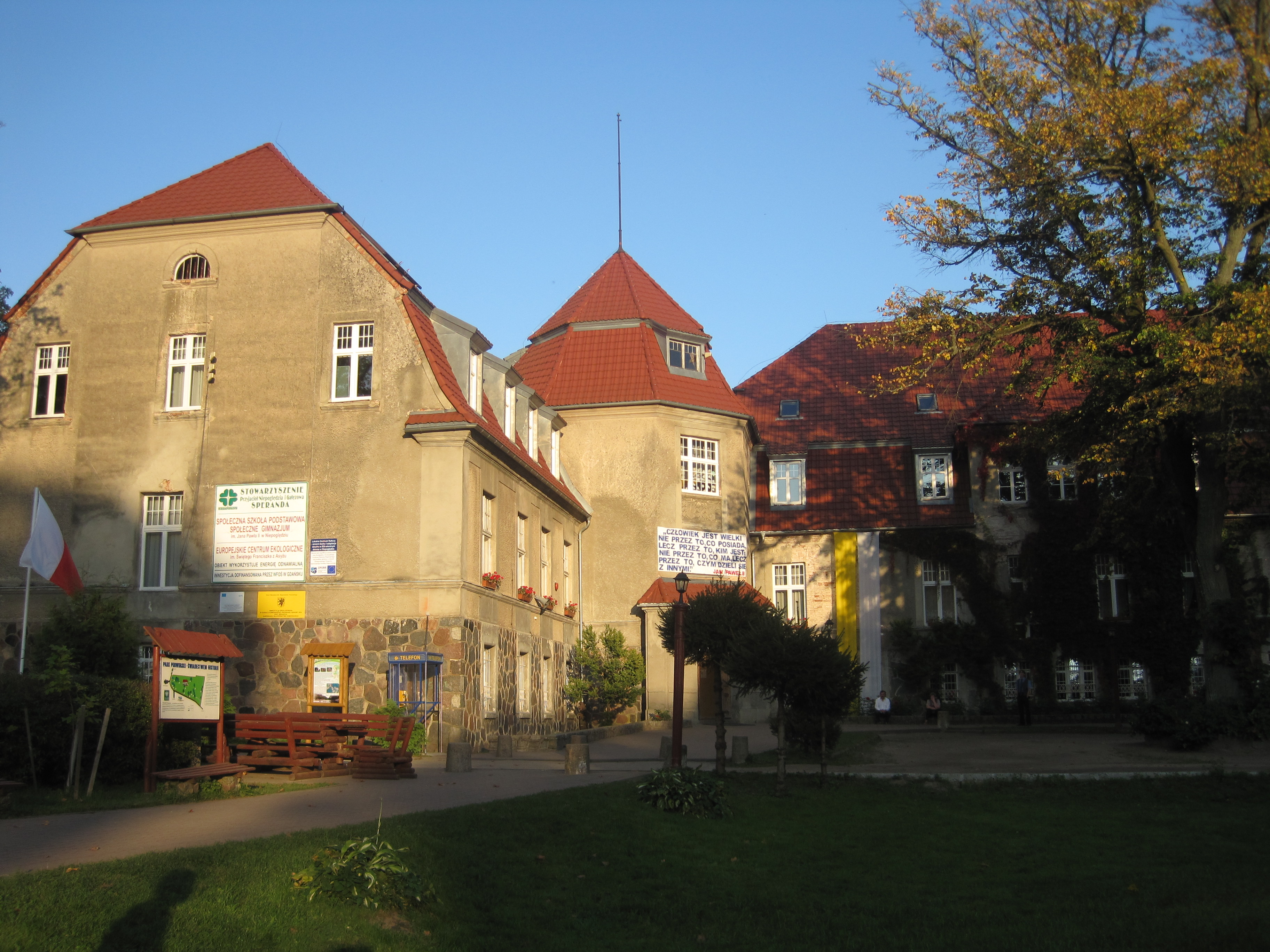 Pałac w stylu angielskim w Niepoględziu